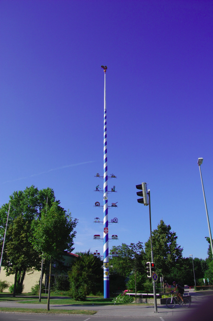 Neuried: Maibaum